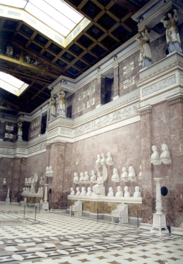 Wallhalla in Regensburg Innenansicht